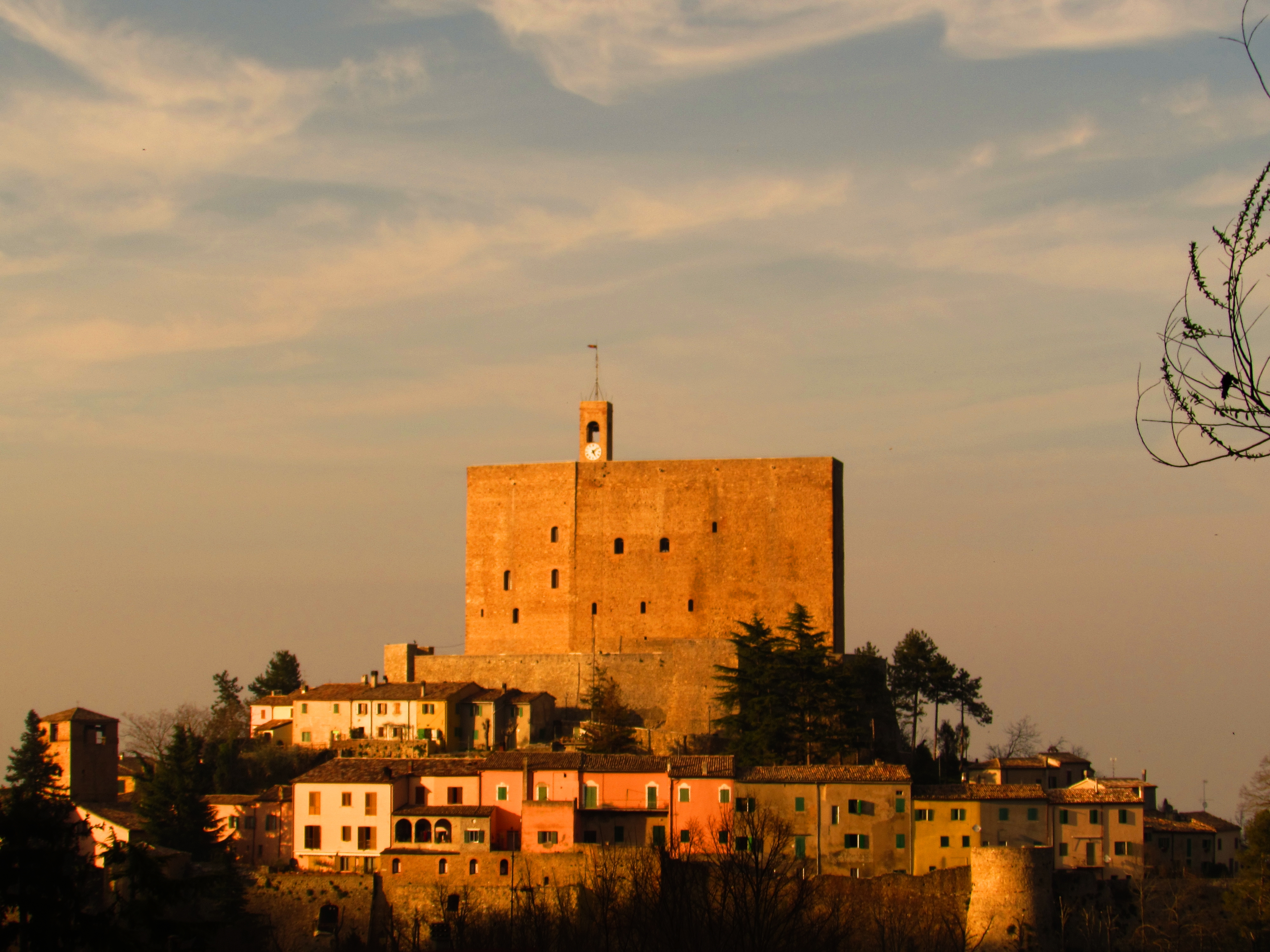 Rocca Malatestiana This is a photo of a monument which is part of cultural heritage of Italy.